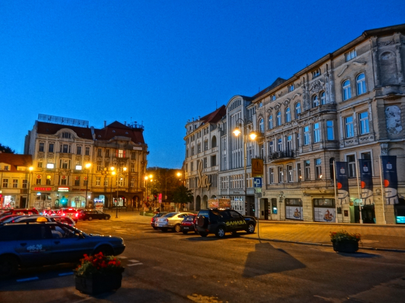 Plac Teatralny w Bydgoszczy